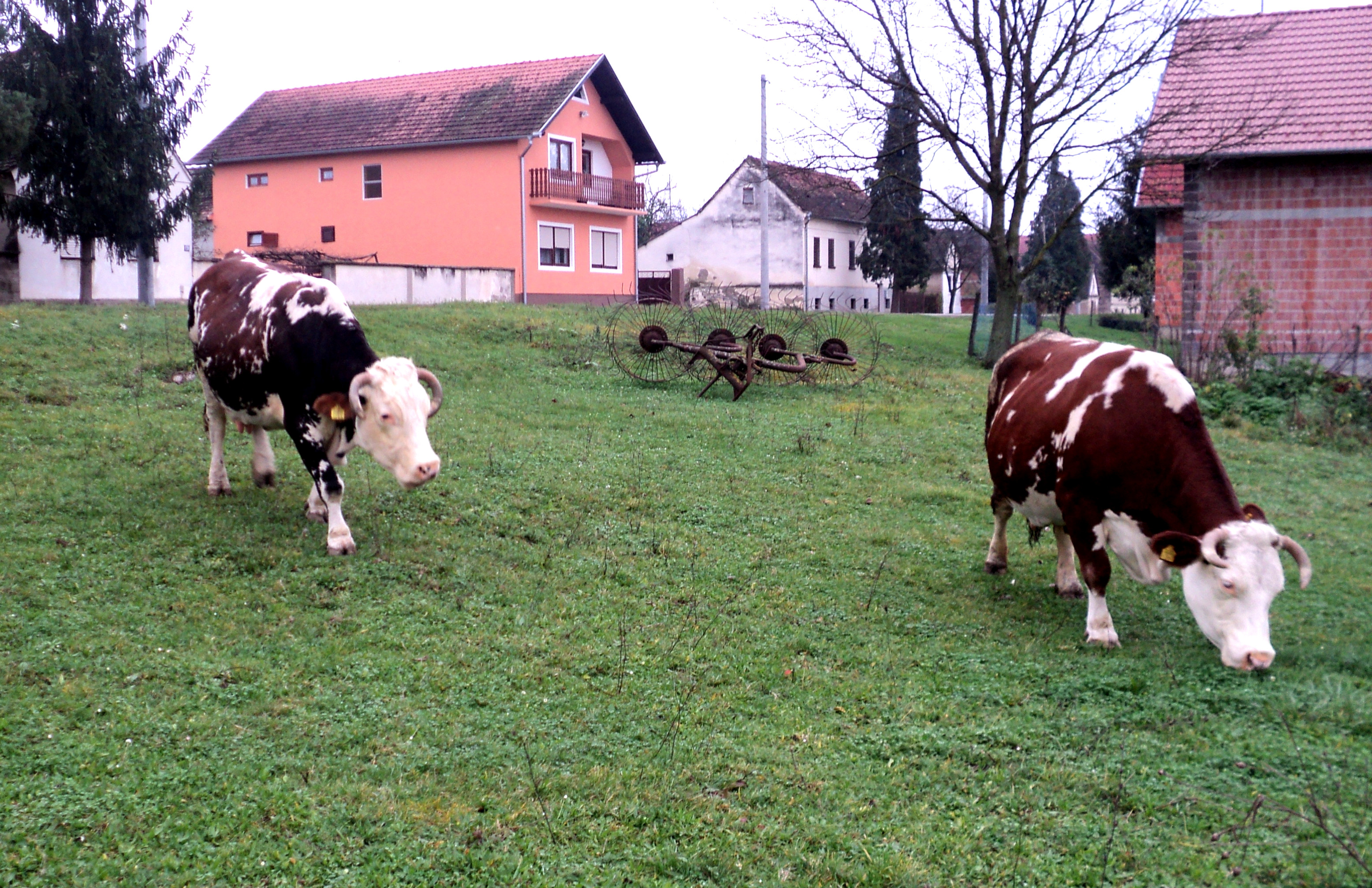 Kreve na ispaši